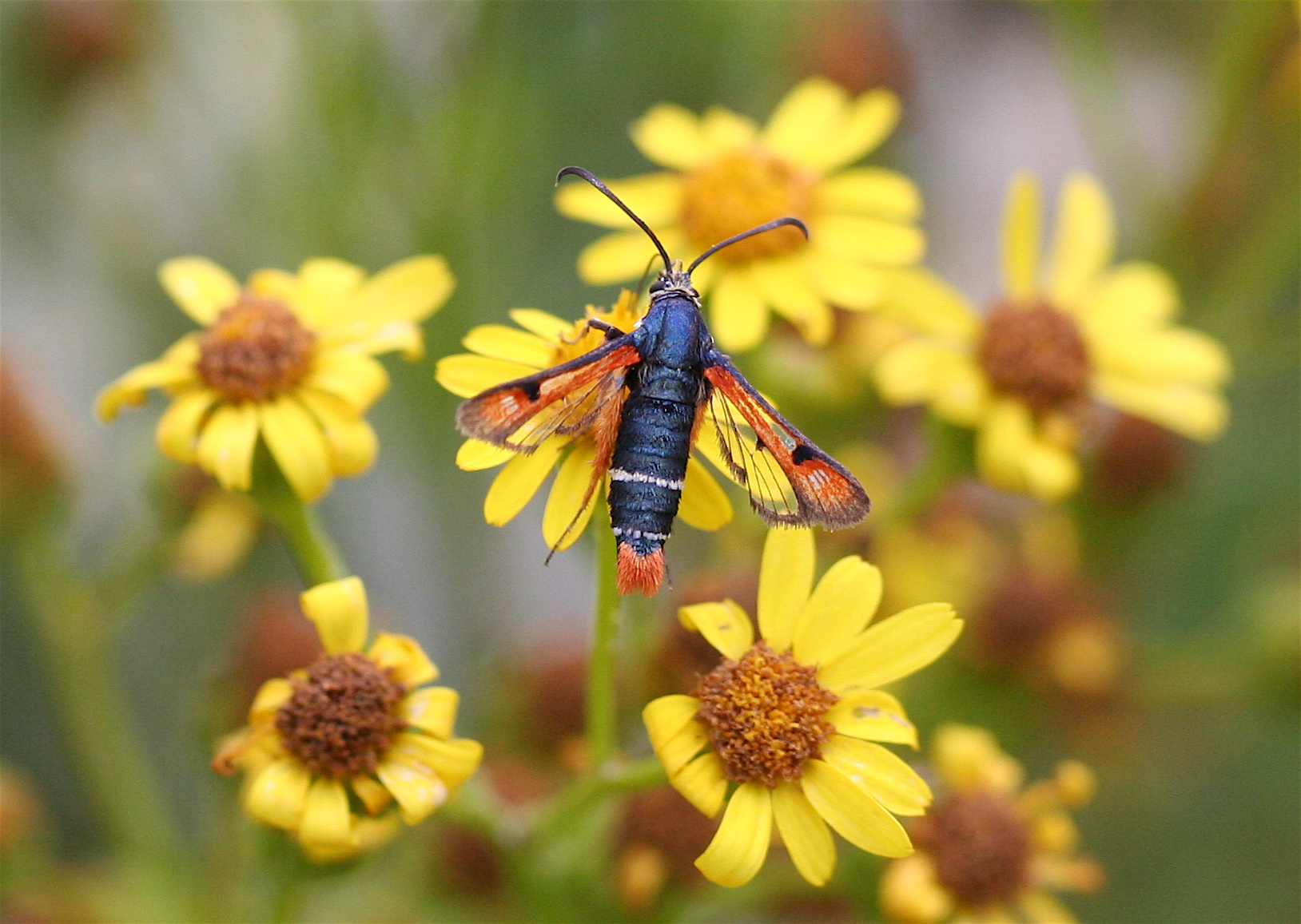 Lepidoptera - Sesiidae - Pyropteron chrysidiforme